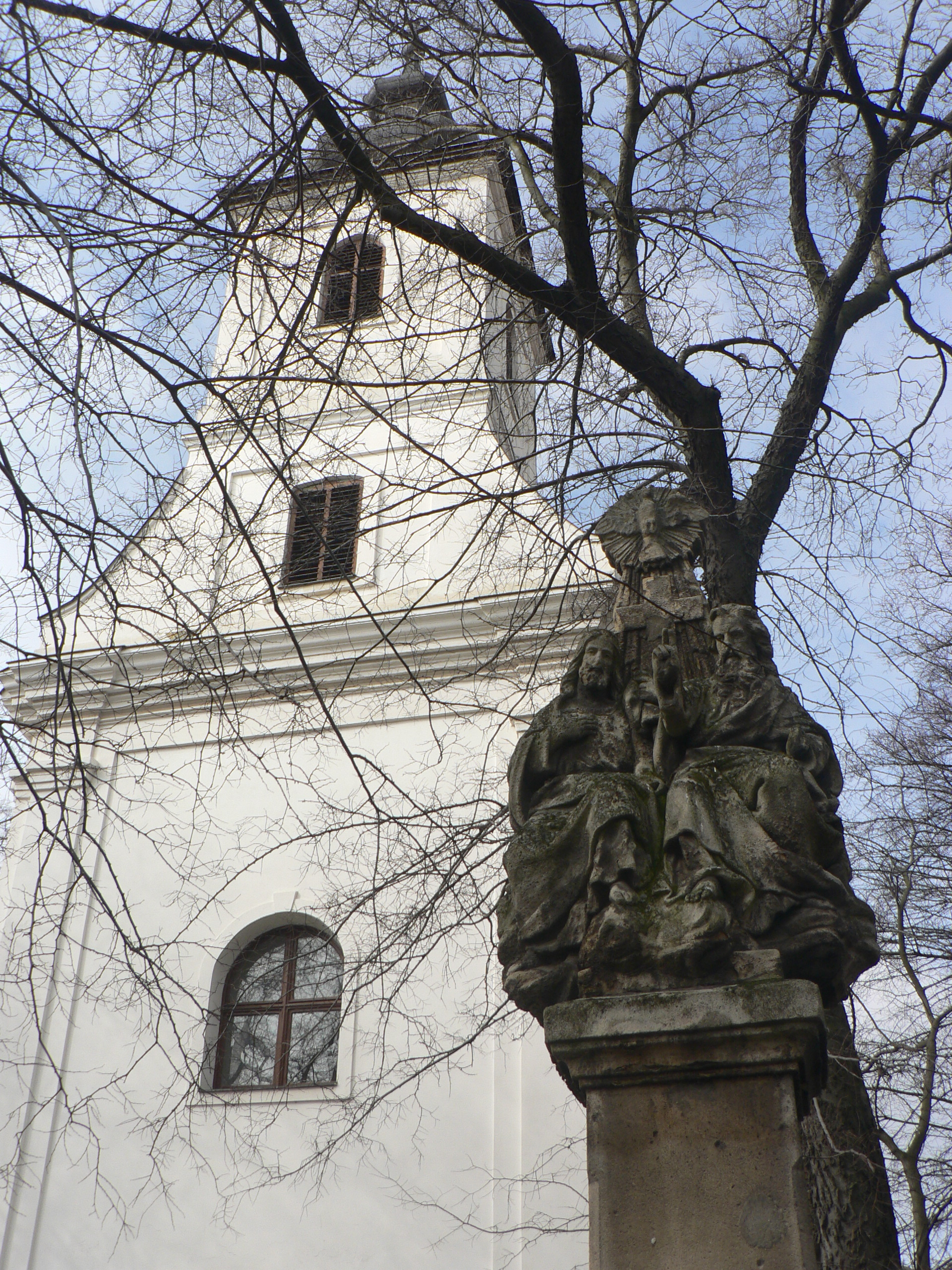 A Szentháromság szobra a herédi rk. templom előtt This is a photo of a monument in Hungary, Identifier: 5740